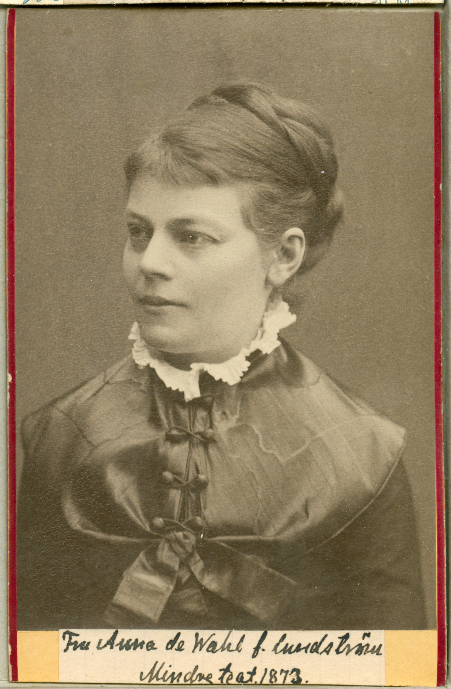 Anna de Wahl, skådespelare och sångare vid Mindre teatern 1873